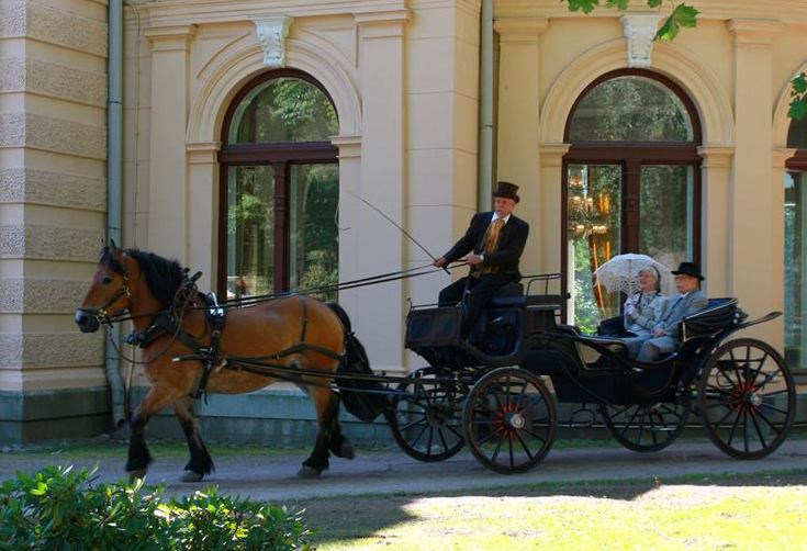 Patruunapari saapumassa juhlien kunniavieraiksi.